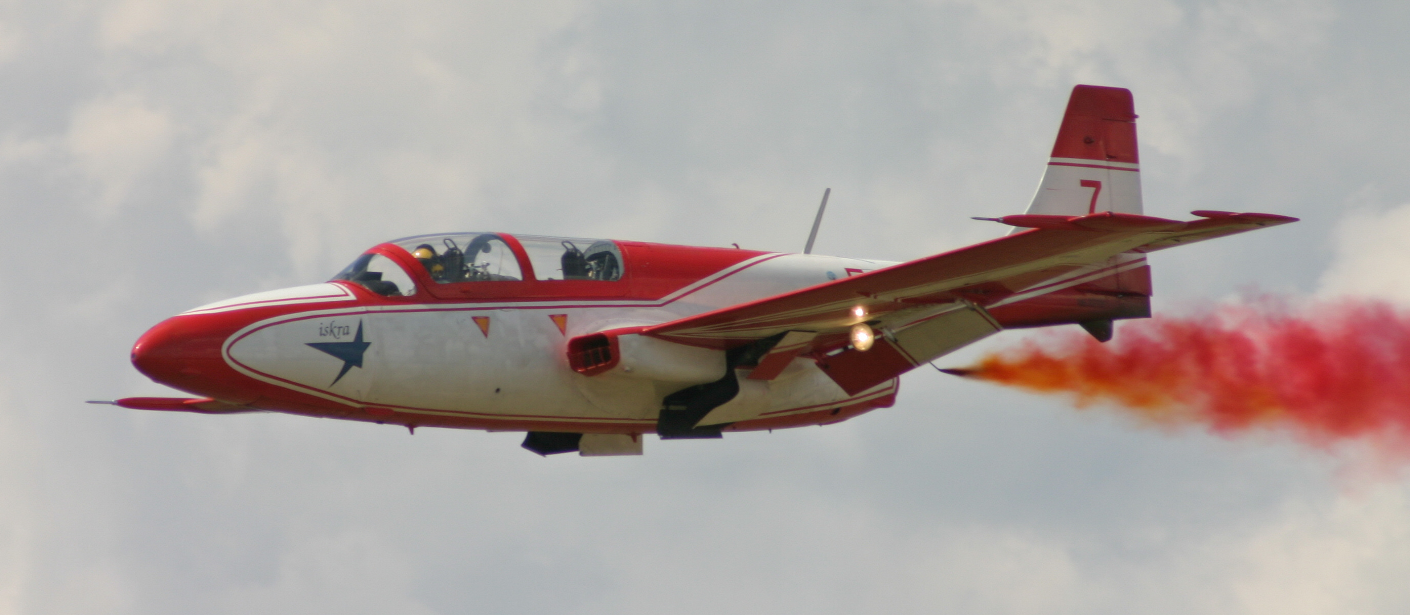 TS-11 Iskra MR - samolot szkolno-treningowy, należący do grupy akrobacyjnej Biało-Czerwone Iskry podczas Międzynarodowego Pikniku Lotniczego "Góraszka" w 2007